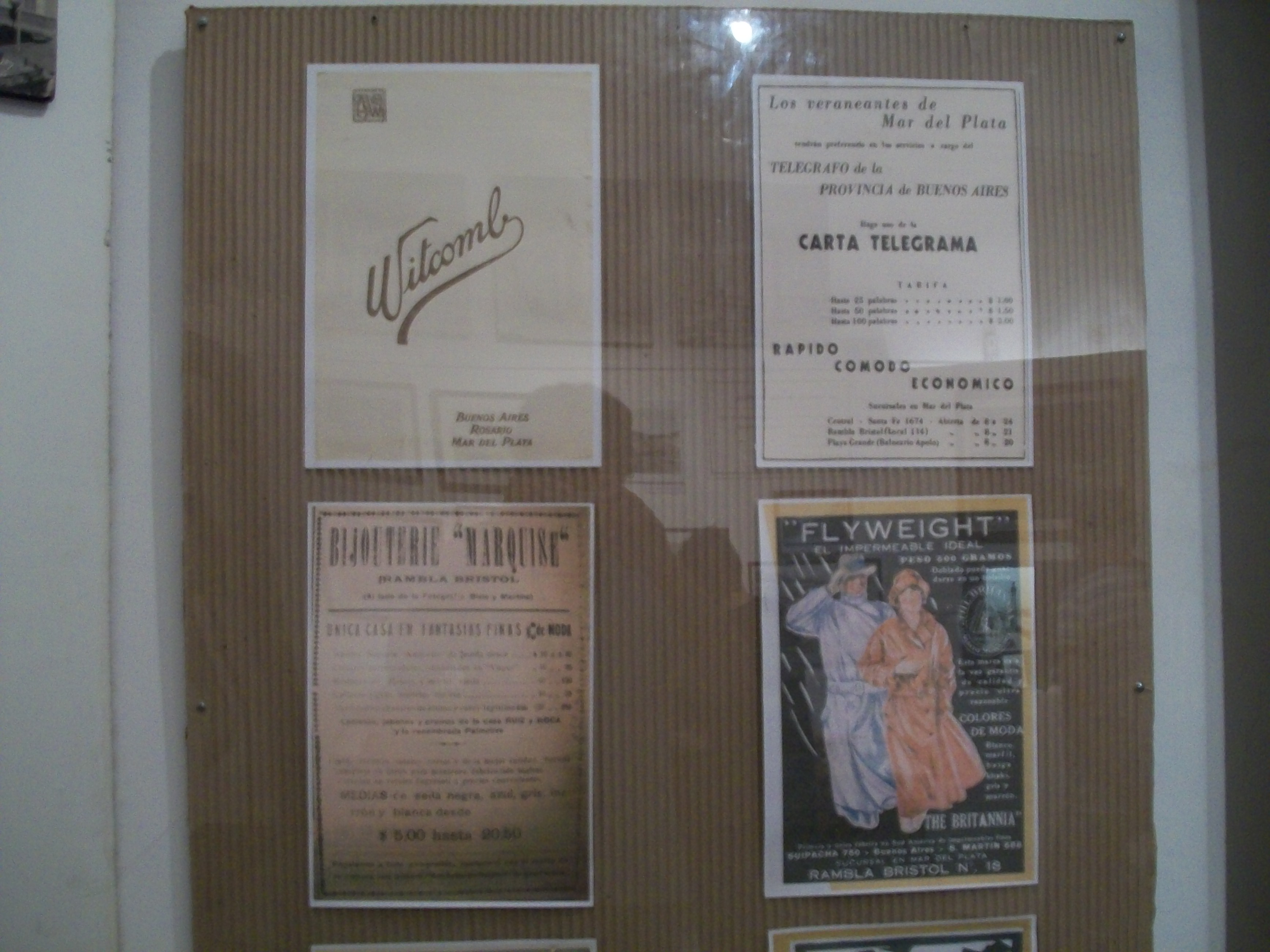 Museo Hist¾rico Municipal Don Rodolfo T. Barili, Mar del Plata, Argentina